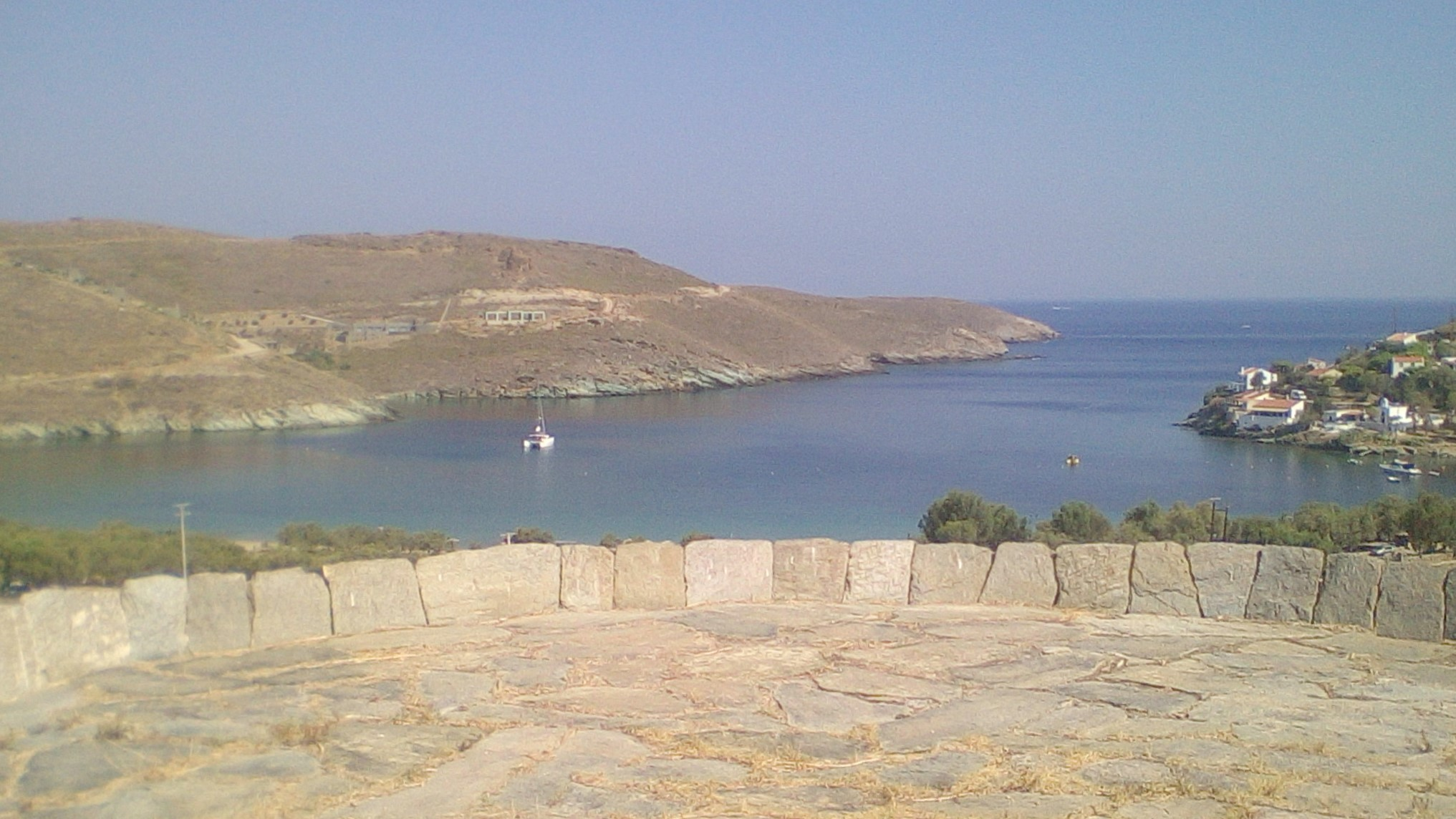 Πανόραμα Οτζιά από παλαιό πέτρινο αλώνι. Σε πρώτο πλάνο οι "ατζέροι", όρθιες πλάκες που περιβάλλουν τα αλώνια, κλασική τοπική αρχιτεκτονική λύση